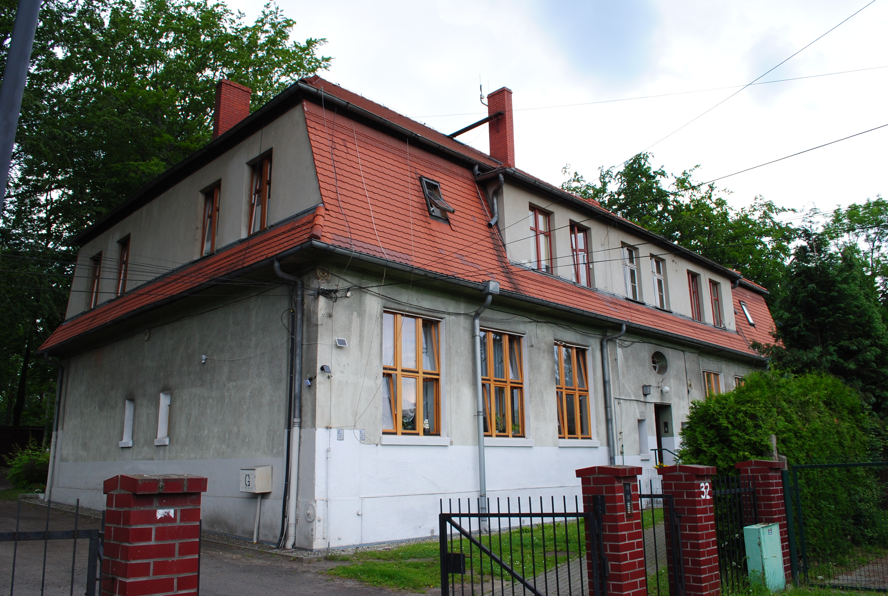 Katowice-Giszowiec. Ulica Działkowa. Dawna szkoła ewangelicka